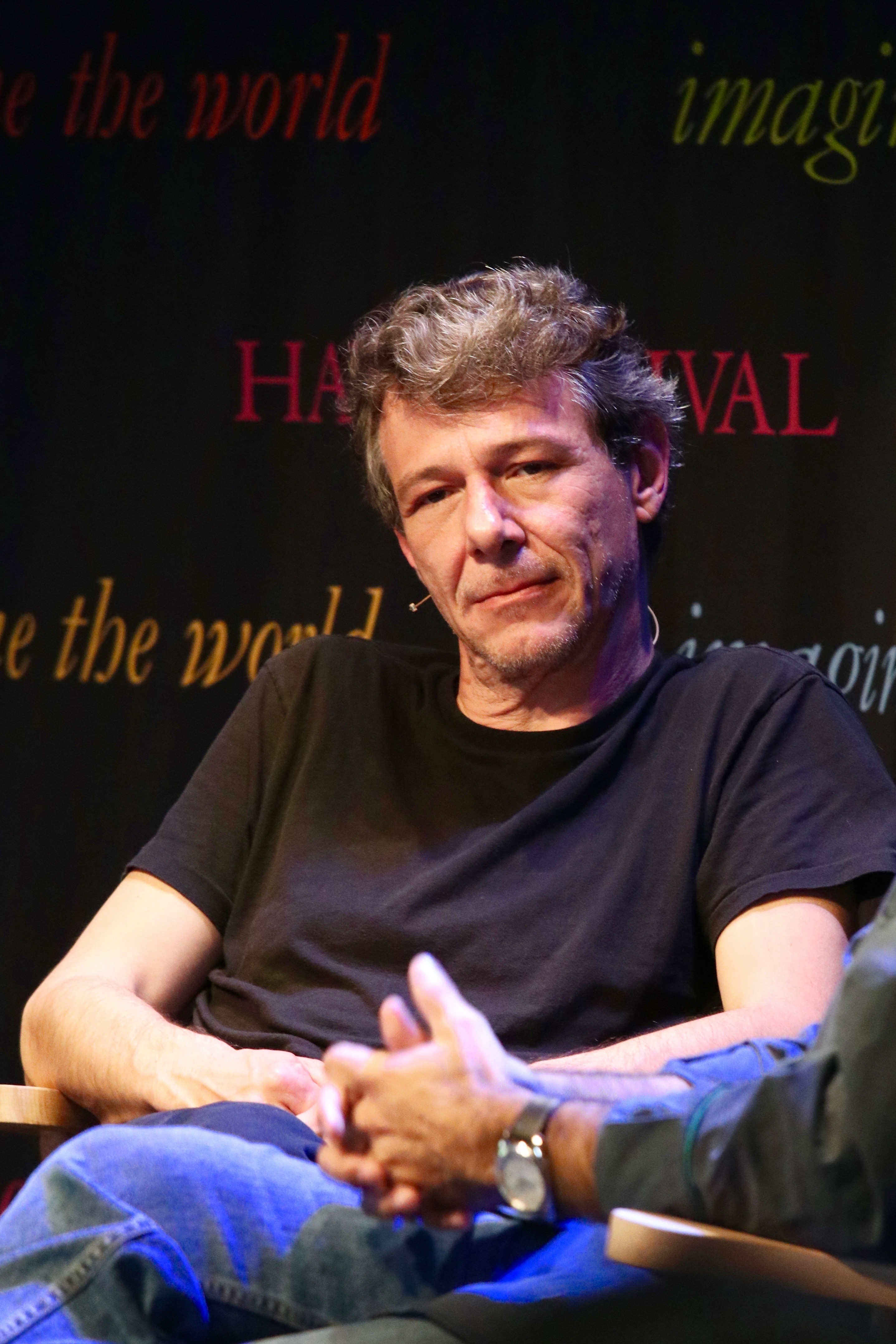 Hay Festival 2016 - Álvaro Enrigue